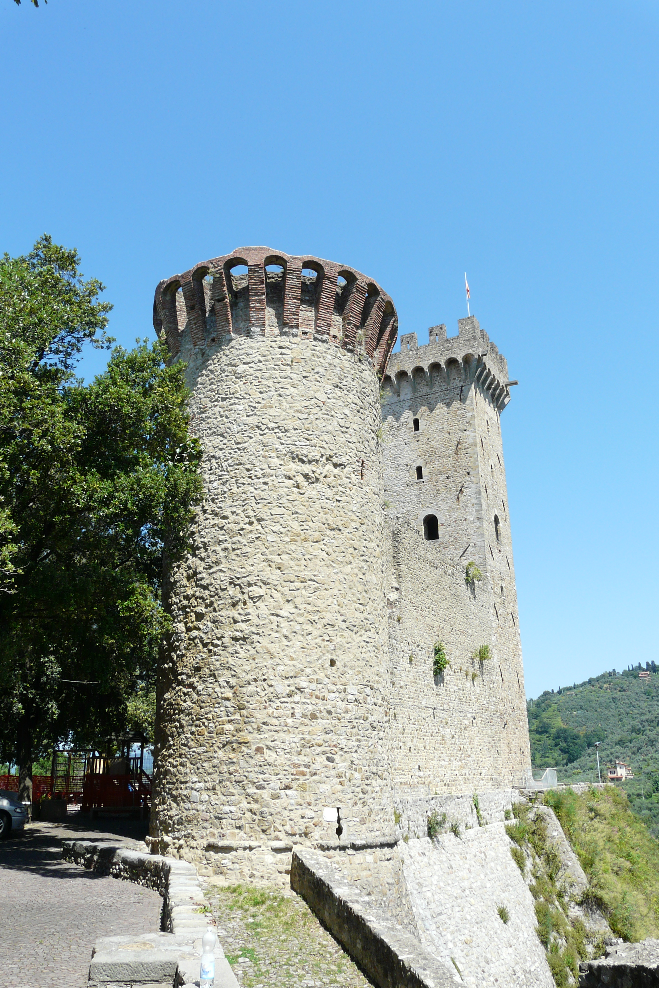 Castello vescovile, Castelnuovo Magra, Liguria, Italia